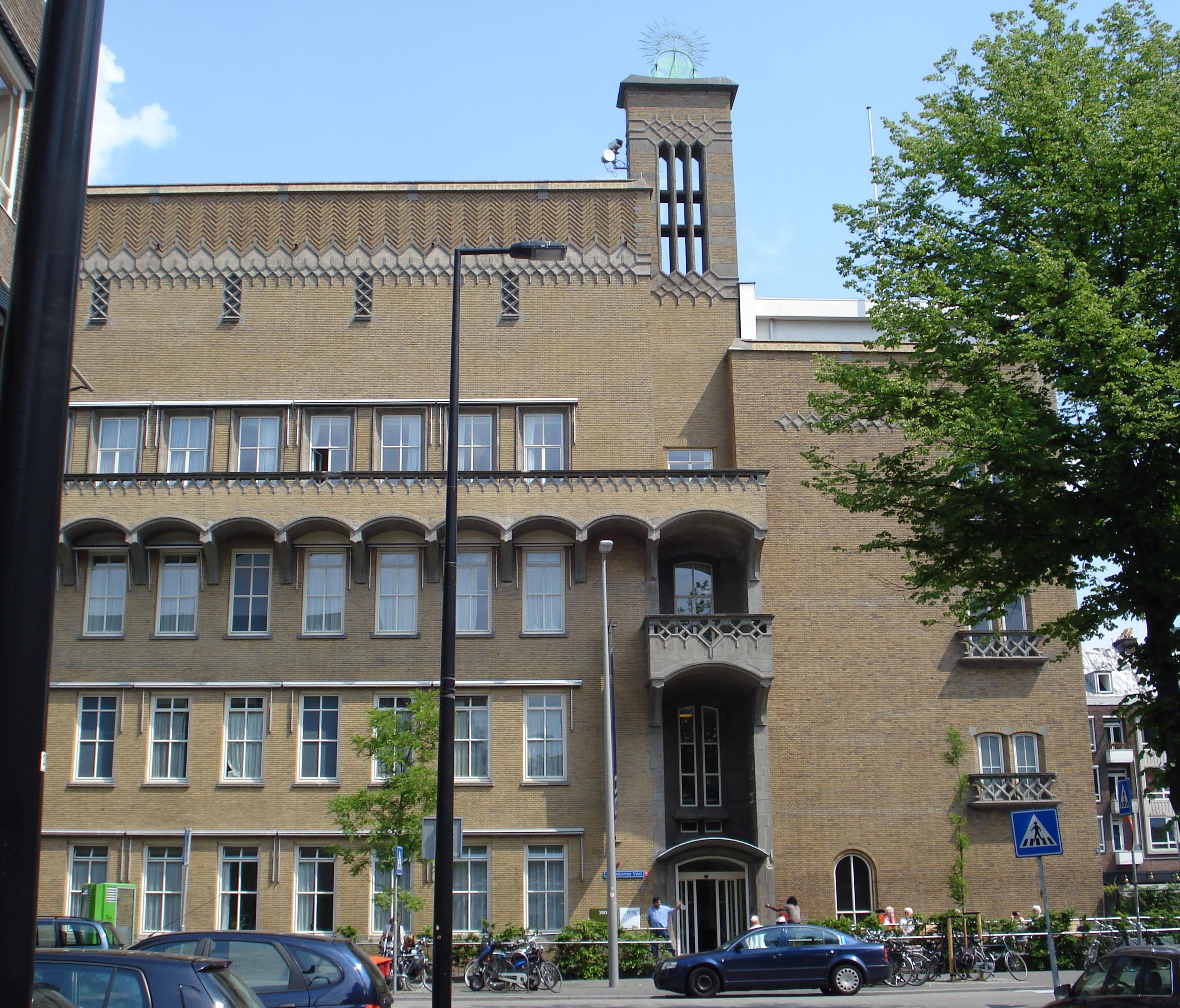 Rotterdam, Schiedamsevest. Het oogziekenhuis.